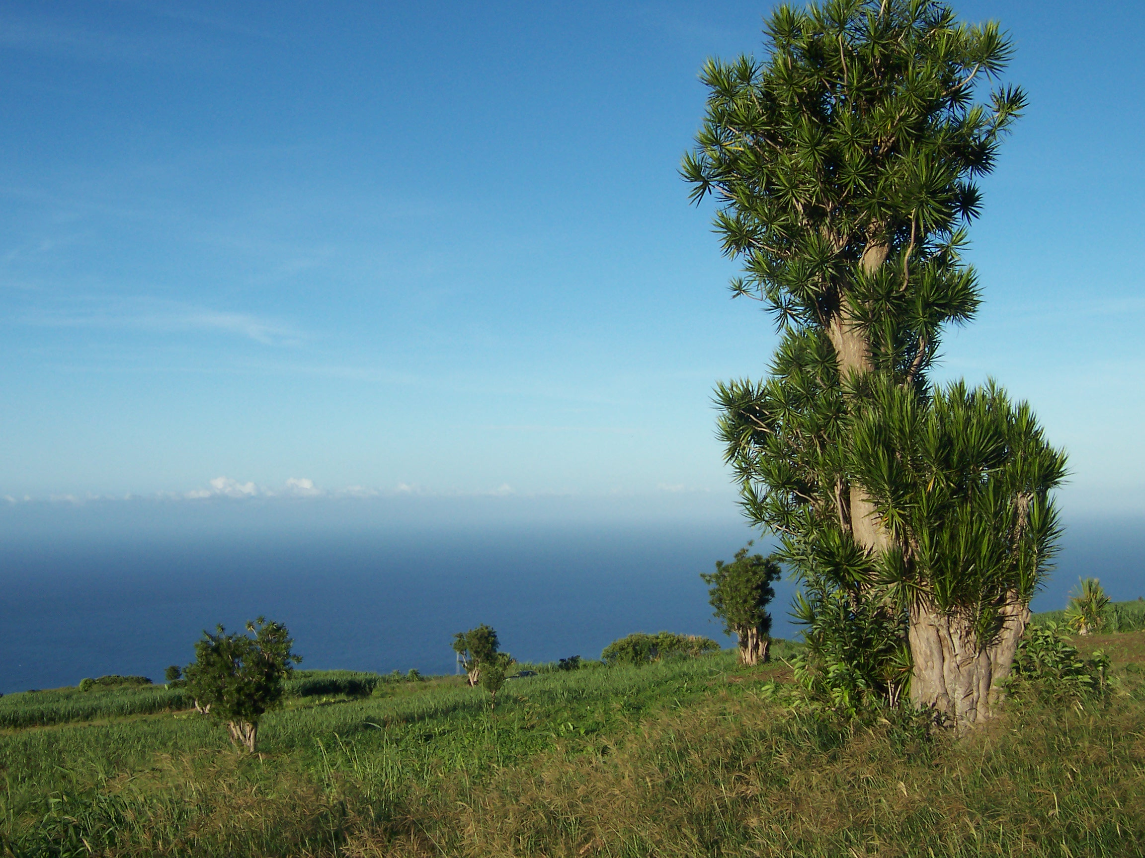 Bois de chandelle (Dracaena reflexa) Photo: B.Navez - 2 MAR 2006 - Réunion island